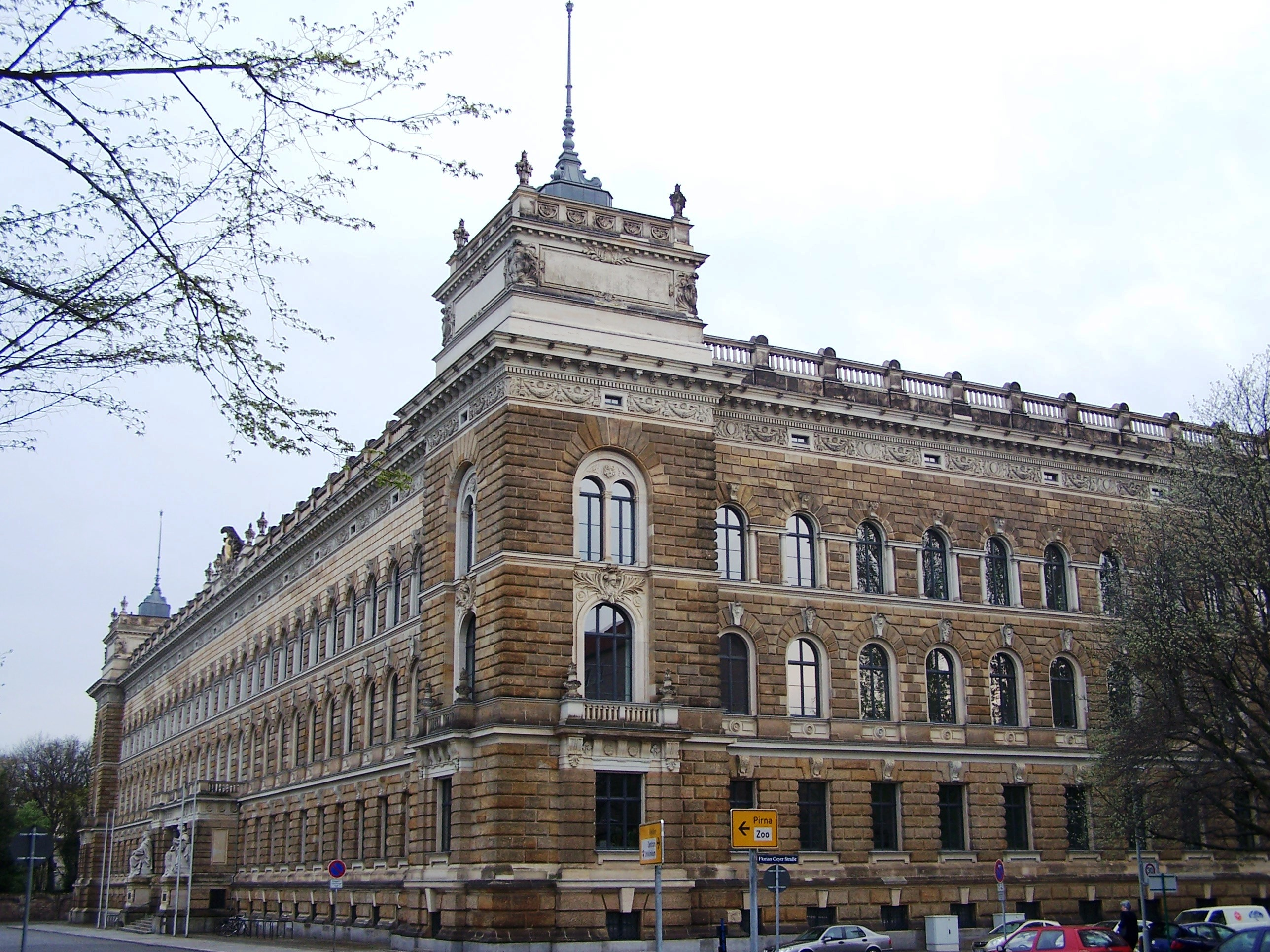 ehemaliges Amtsgericht Dresden, Lothringer Straße, erbaut 1888-1892 nach Entwurf des Leipziger Architekten Arwed Roßbach, heute als Landgericht genutzt